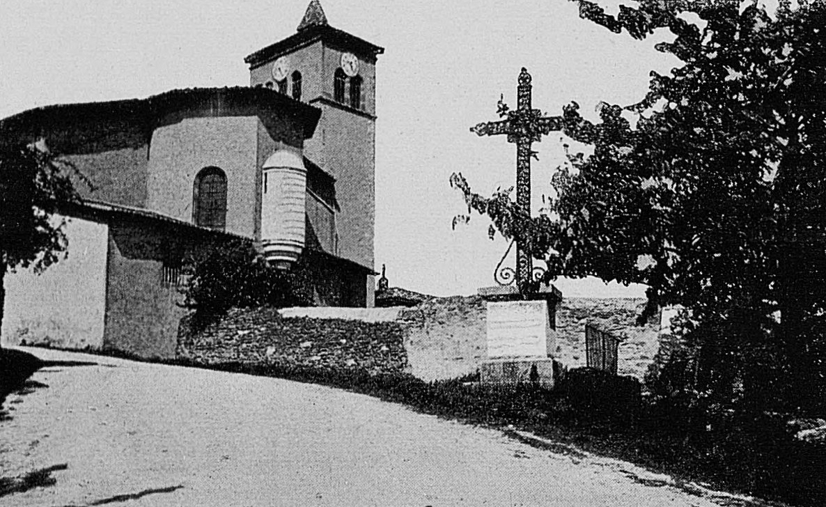 Dictionnaire illustré des communes du département du Rhône. Tome 1 / par MM. E. de Rolland et D. Clouzet.